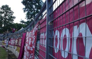 Fan Transparente Servette FC